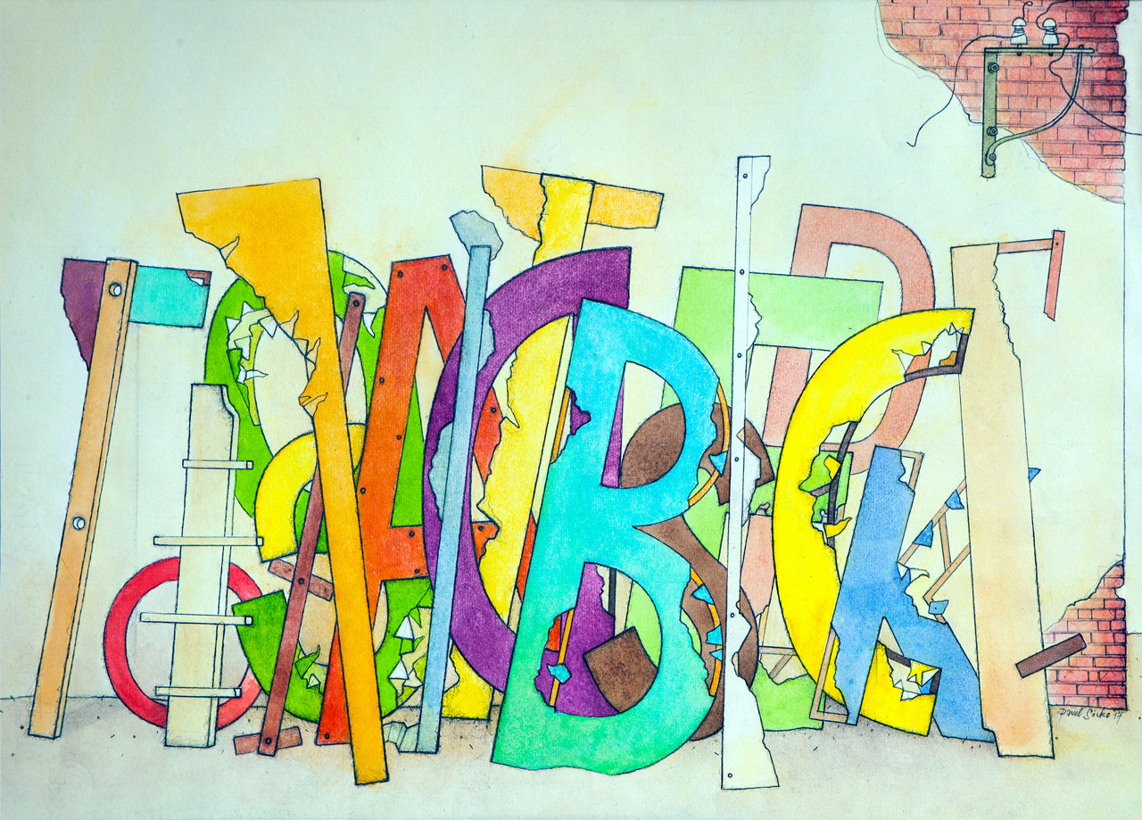 Pavel Sivko, Odložená reklama, kolorovaná kresba